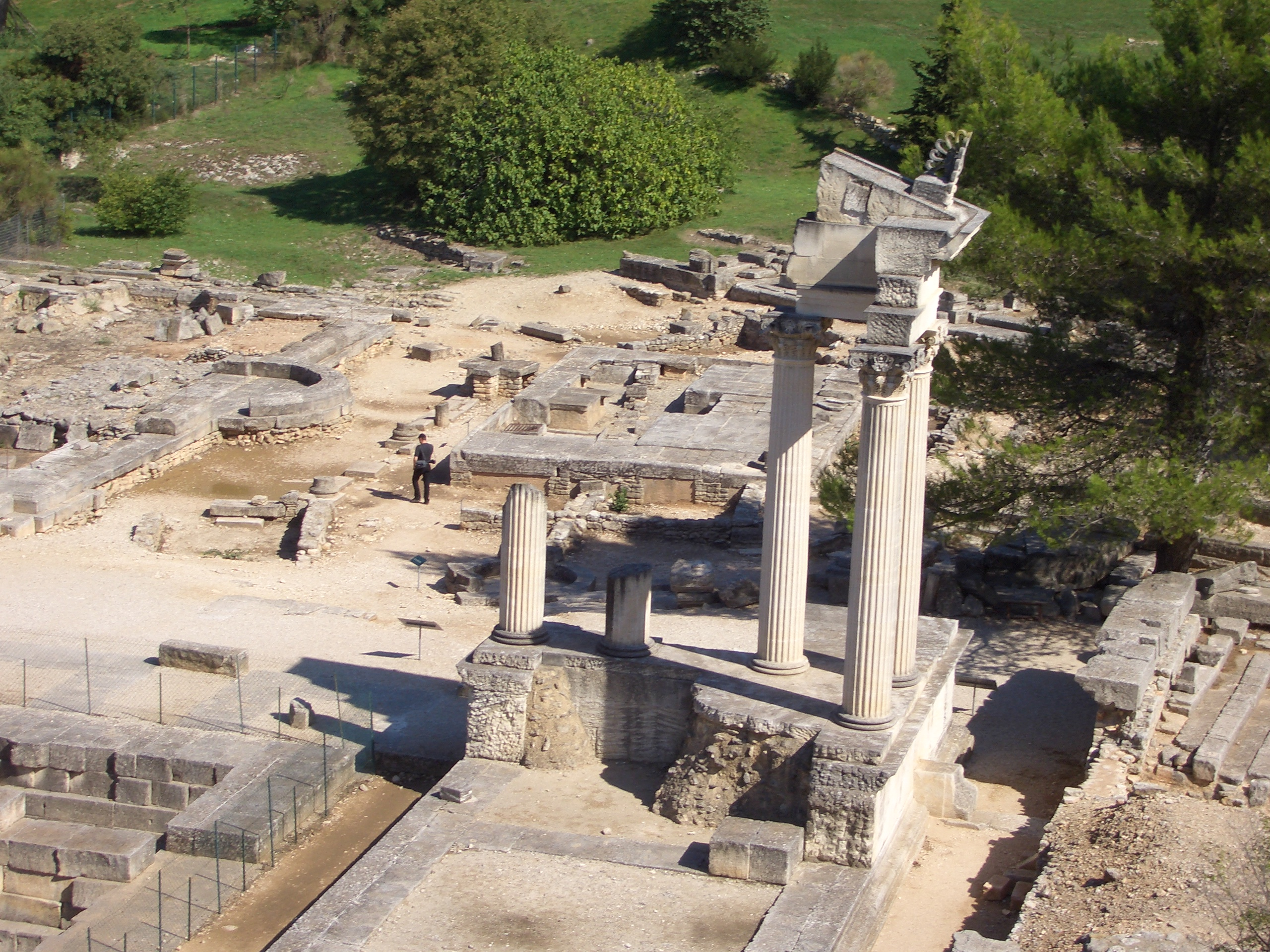 Glanum